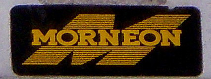 Skylt för Morneon